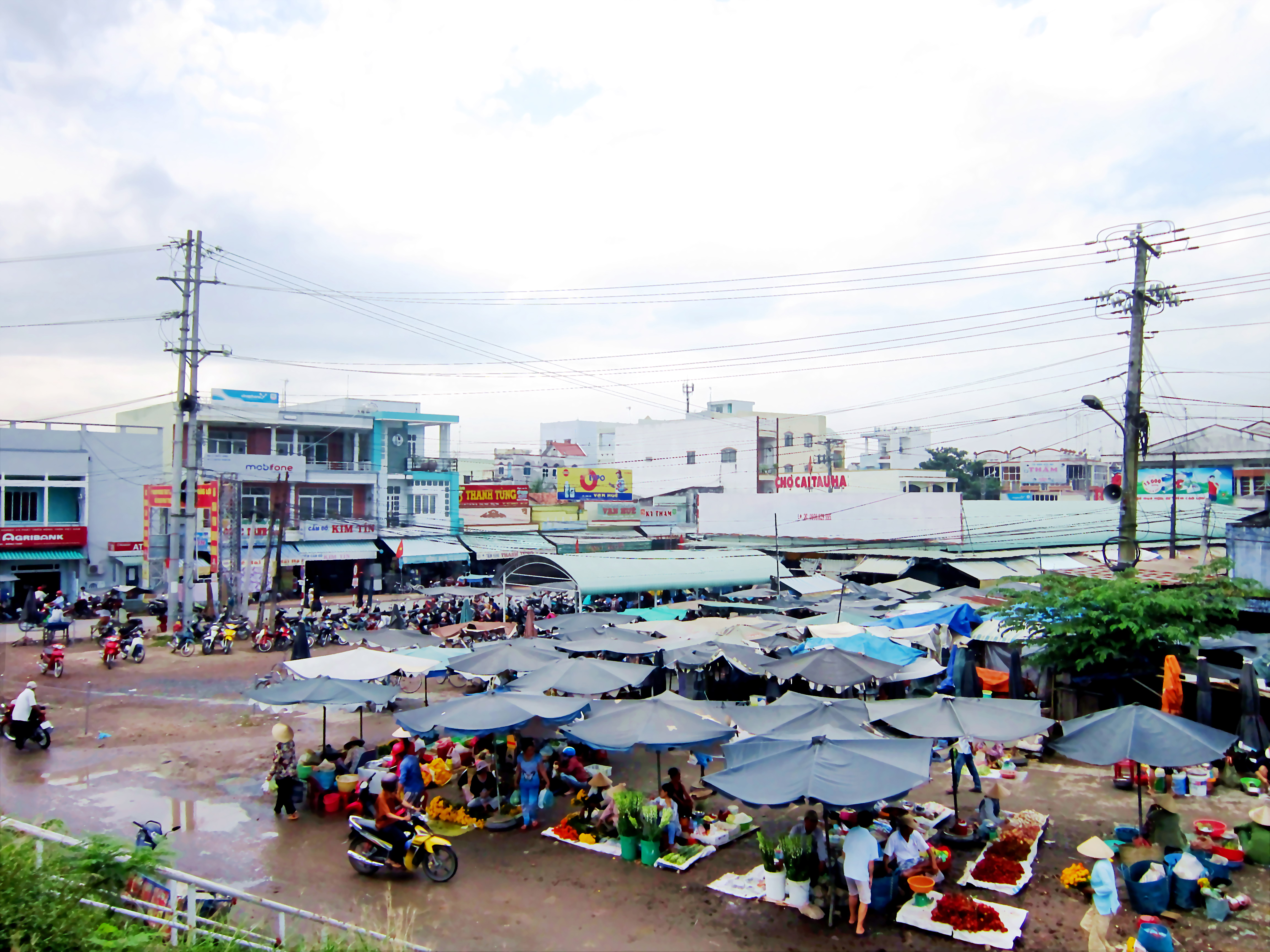 Chợ thị trấn Cái Tàu Hạ, huyện Châu Thành, tỉnh Đồng Tháp, Việt Nam.